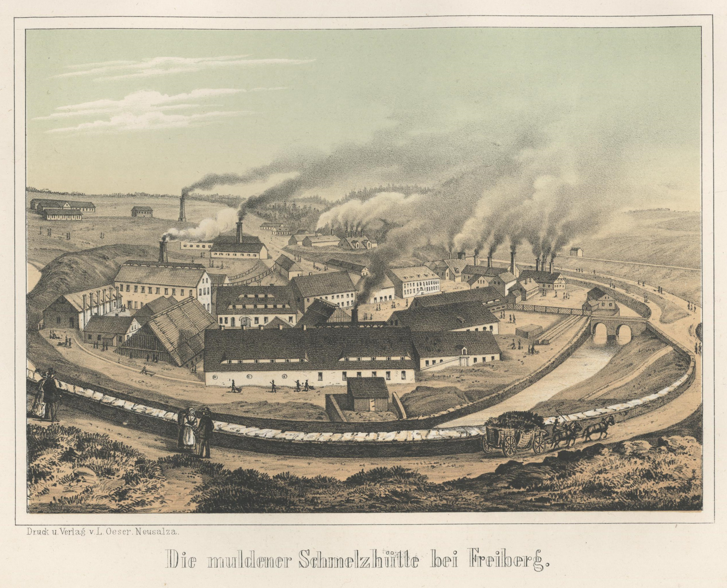 Die muldener Schmelzhütte bei Freiberg aus: Album der Sächsischen Industrie Erster Band